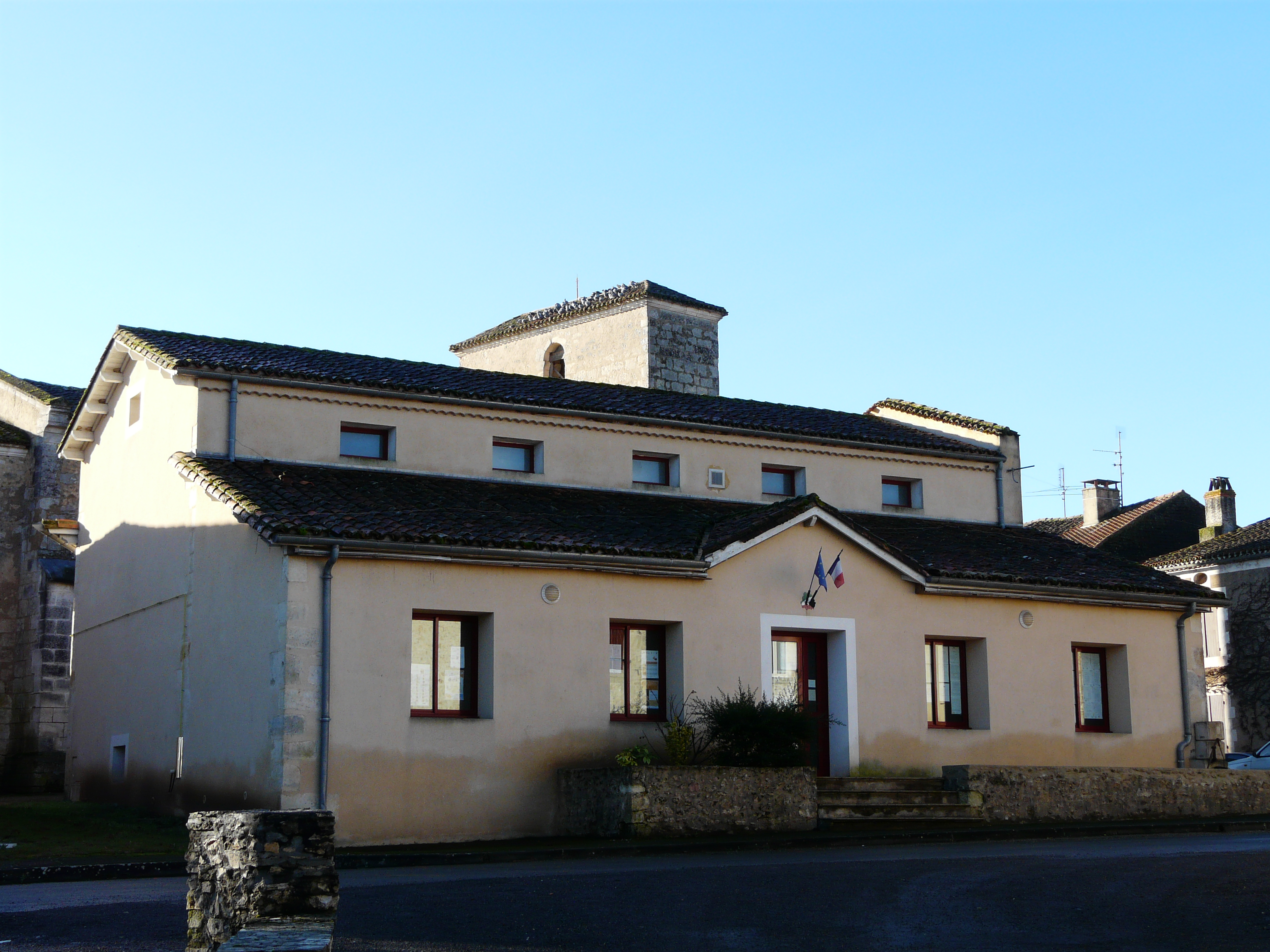 La mairie de Saint-Maime-de-Péreyrol, Dordogne, France.